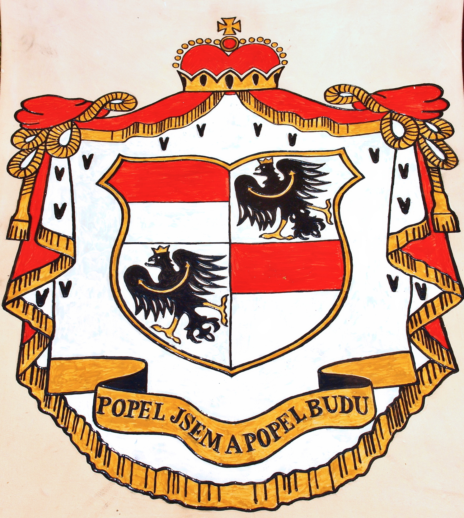 Lobkovický rodový erb